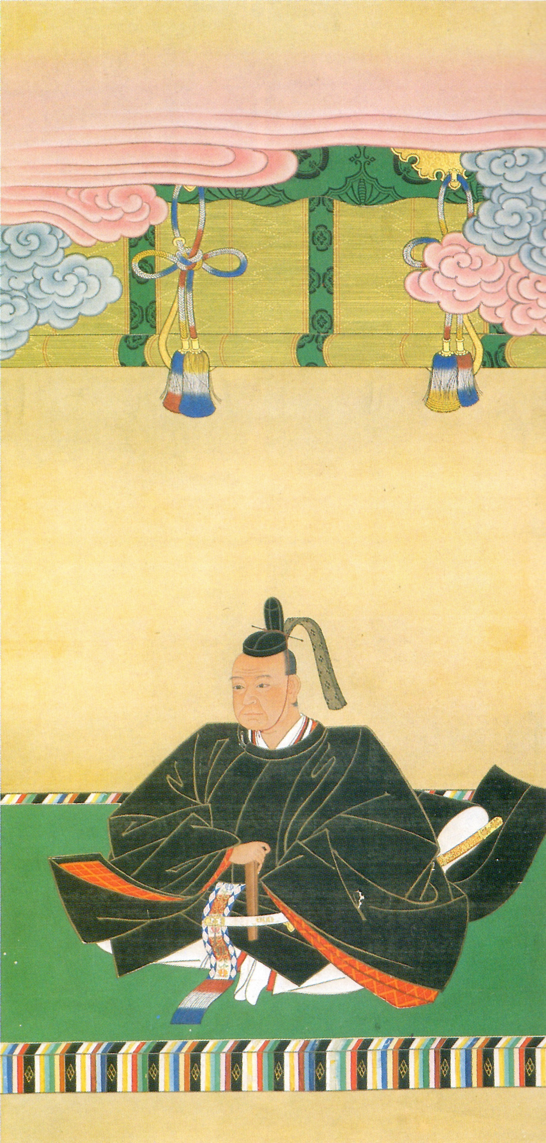 鍋島吉茂の肖像。